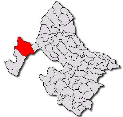 Categorie:Hărţi ale judeţului Mehedinţi